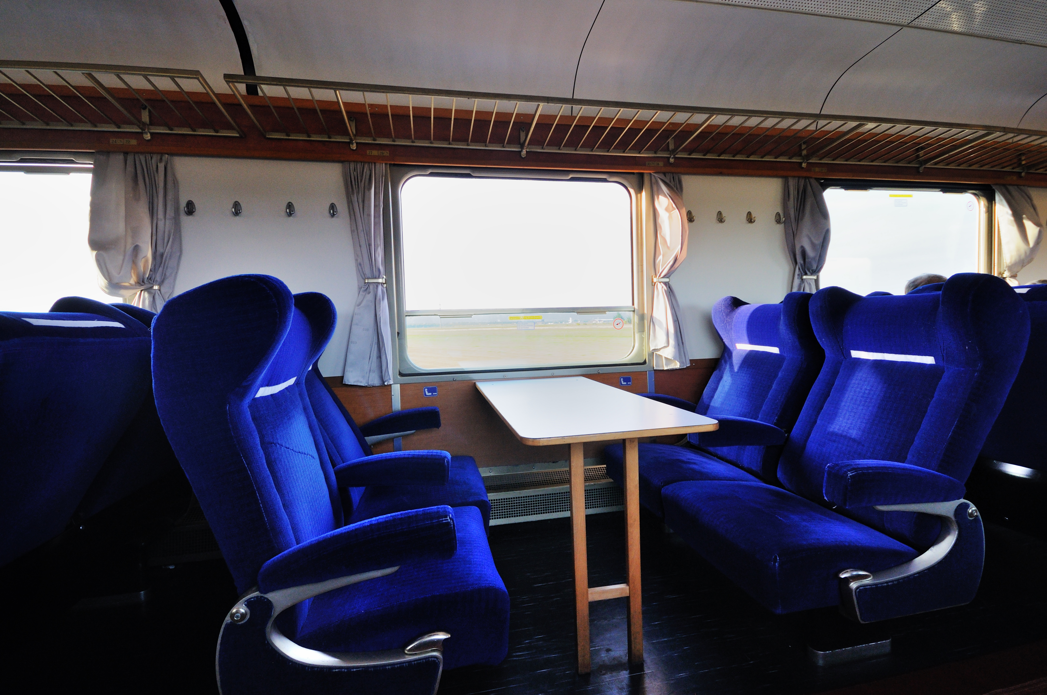 4er-Sitzgruppe im 1. Klasse-Schlierenwagen Ap 9732 959-8